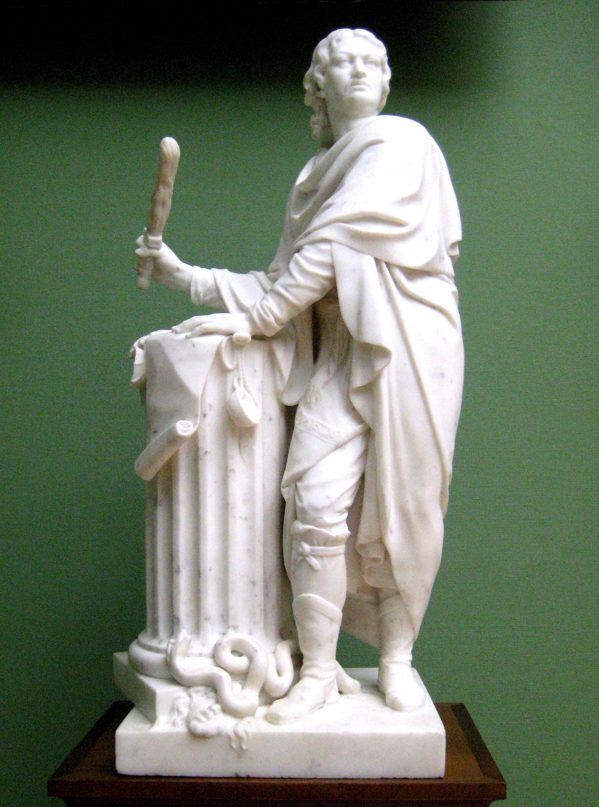 М.И. Козловский. "Яков Долгорукий, сжигающий царский указ". 1796. ГТГ